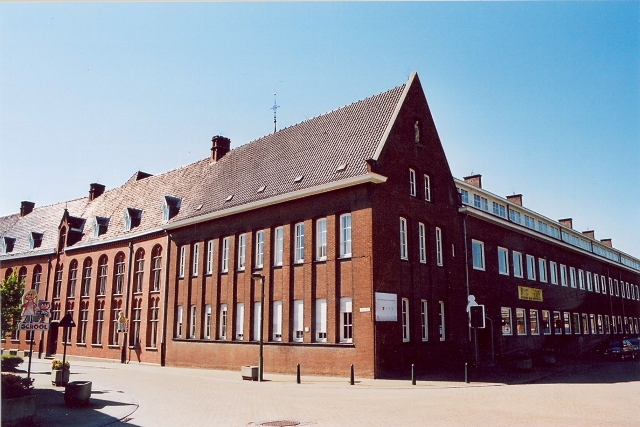 stationsstraat_01_koolskampstraat_04_06